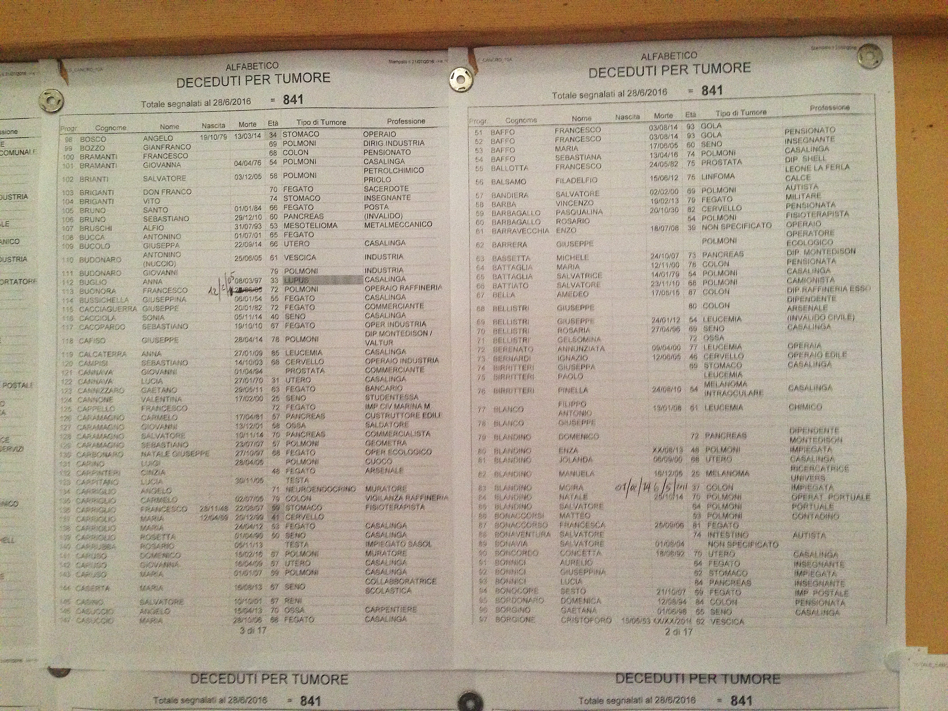 Lista dei morti di cancro ad Augusta affissa da Don Prisutto